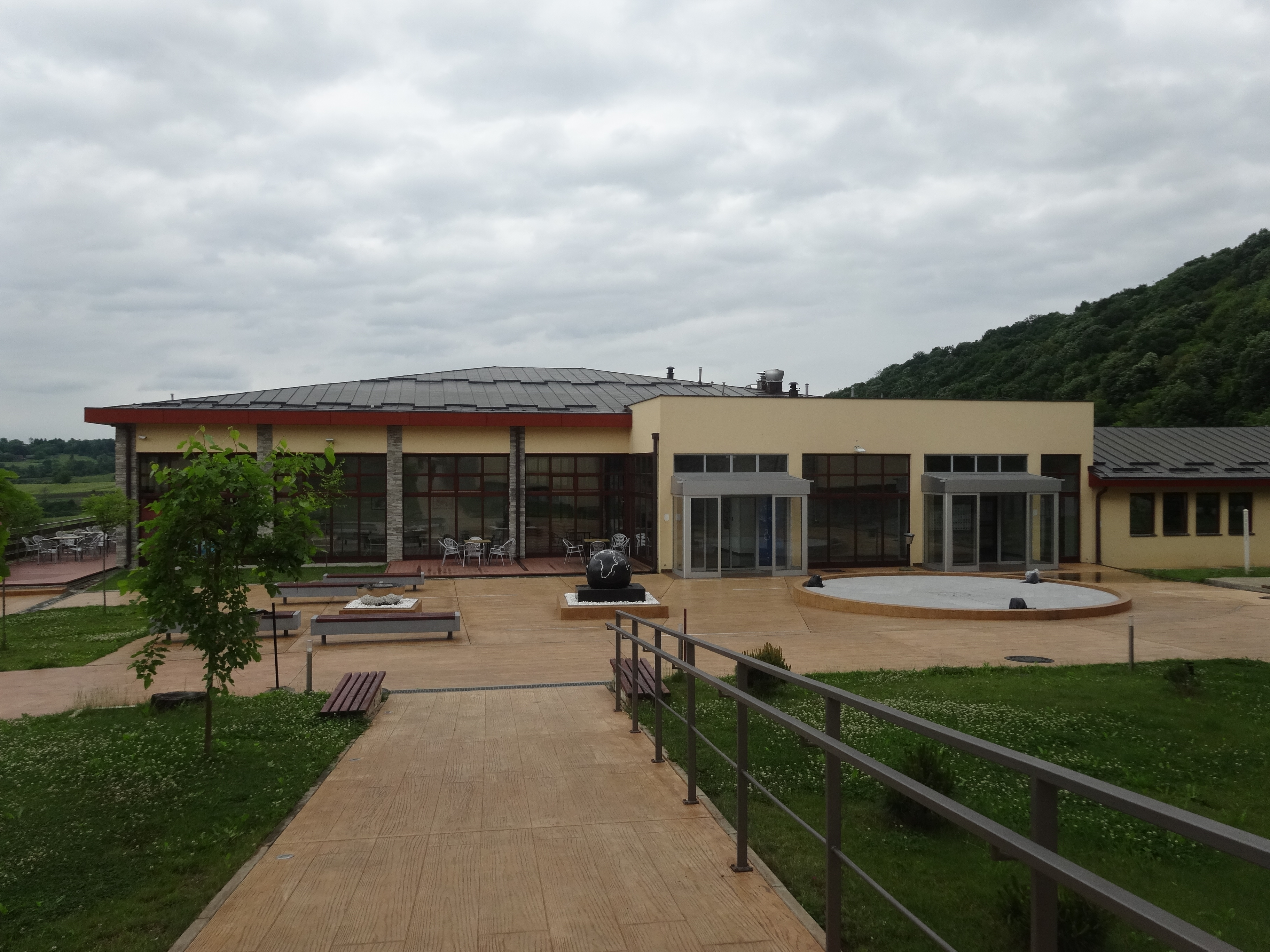 Istraživačka stanica Petnica - restoran.